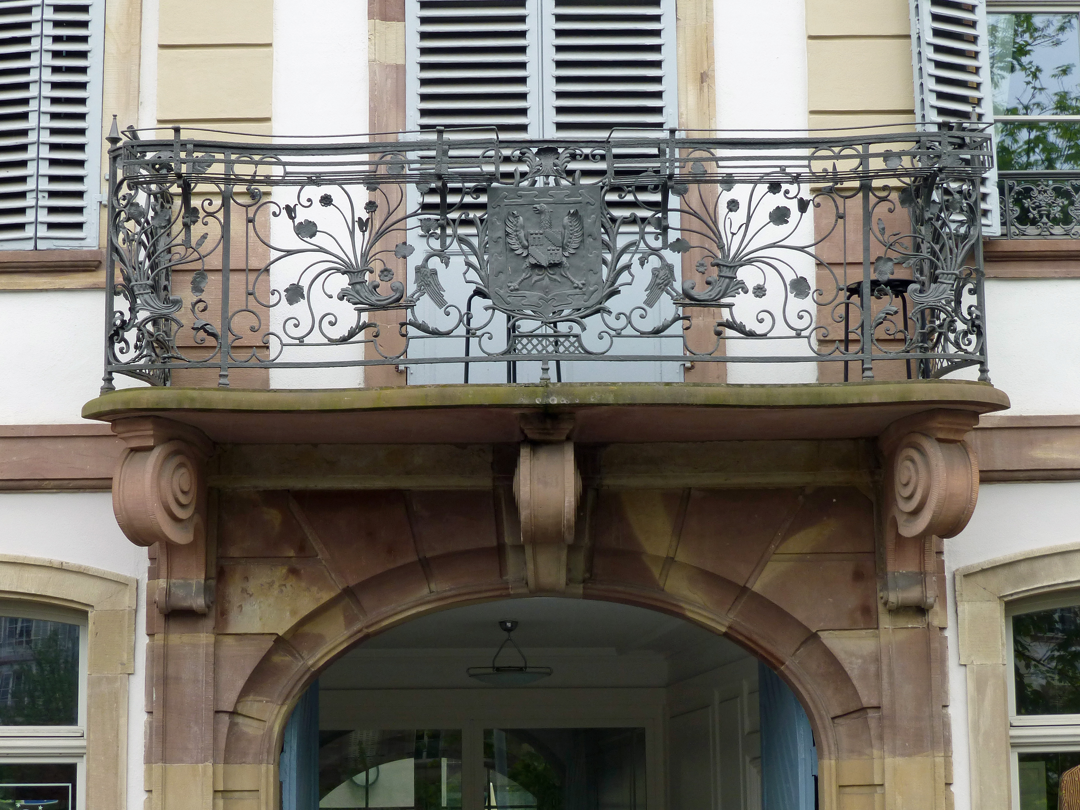 Strasbourg : maison au 34 quai des Bateliers ; façade de style Régence (1748) ; balcon en ferronnerie avec cornes d'abondance et écu des Furstenberg